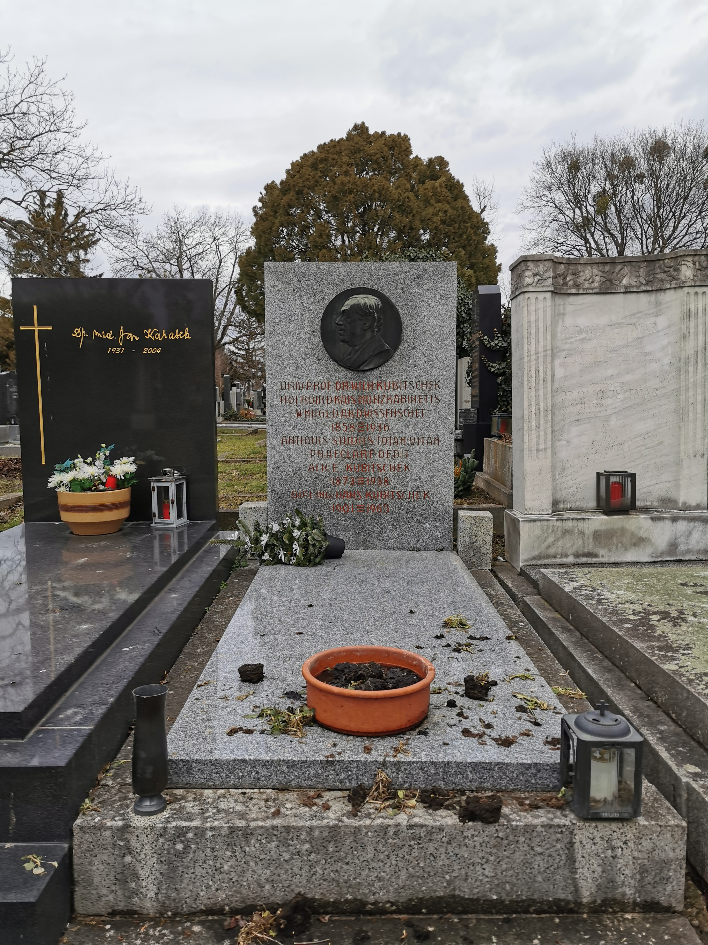 Grab von Wilhelm Kubitschek auf dem Wiener Zentralfriedhof